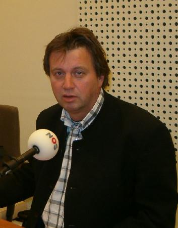 Bert van Slooten (Amsterdam, 29 januari 1960) is een Nederlandse radio- en soms ook televisiepresentator. zelf gemaakte foto, goedgekeurd door de geportretteerde